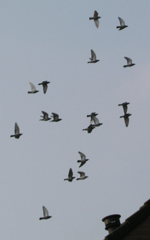 vlucht postduiven cirkelend voor ze door hun eigenaar naar binnen worden geroepen voor de avond